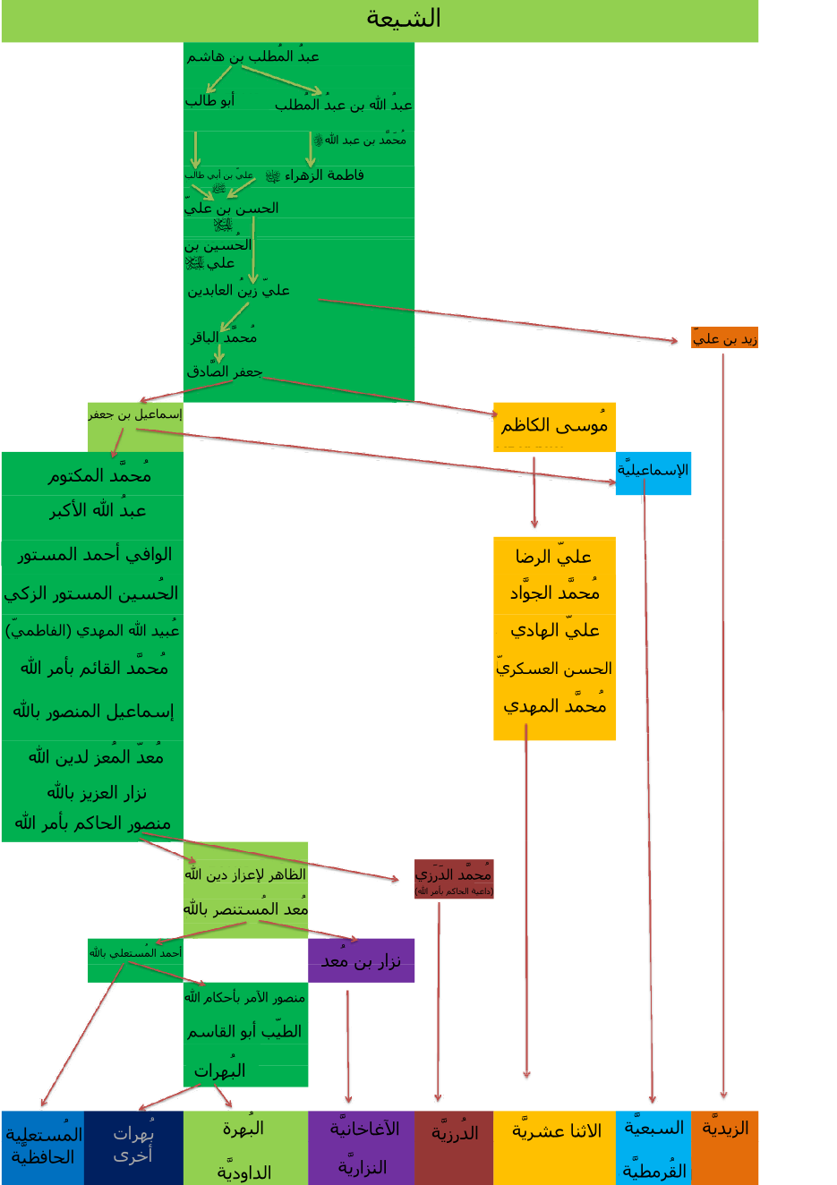 شجرة نسب أئمَّة الشيعة.